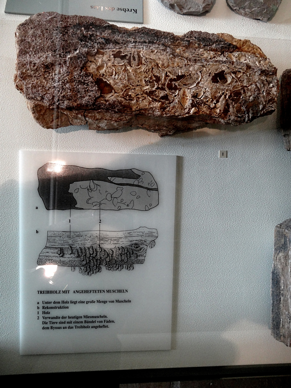 Treibholz mit Muscheln aus dem Schwarzen Jura der Fränkischen Alb; Fundort nahe Bad Staffelstein /Oberfranken; Exponat in der Petrefaktensammlung Kloster Banz